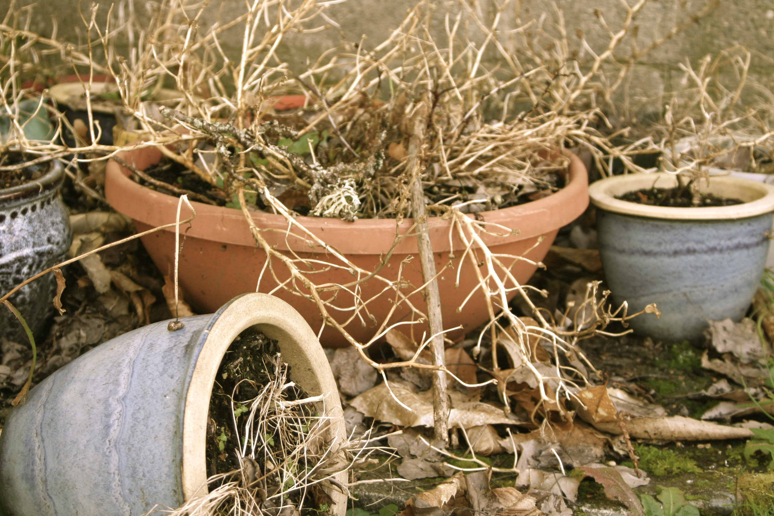 Dead plant in pots